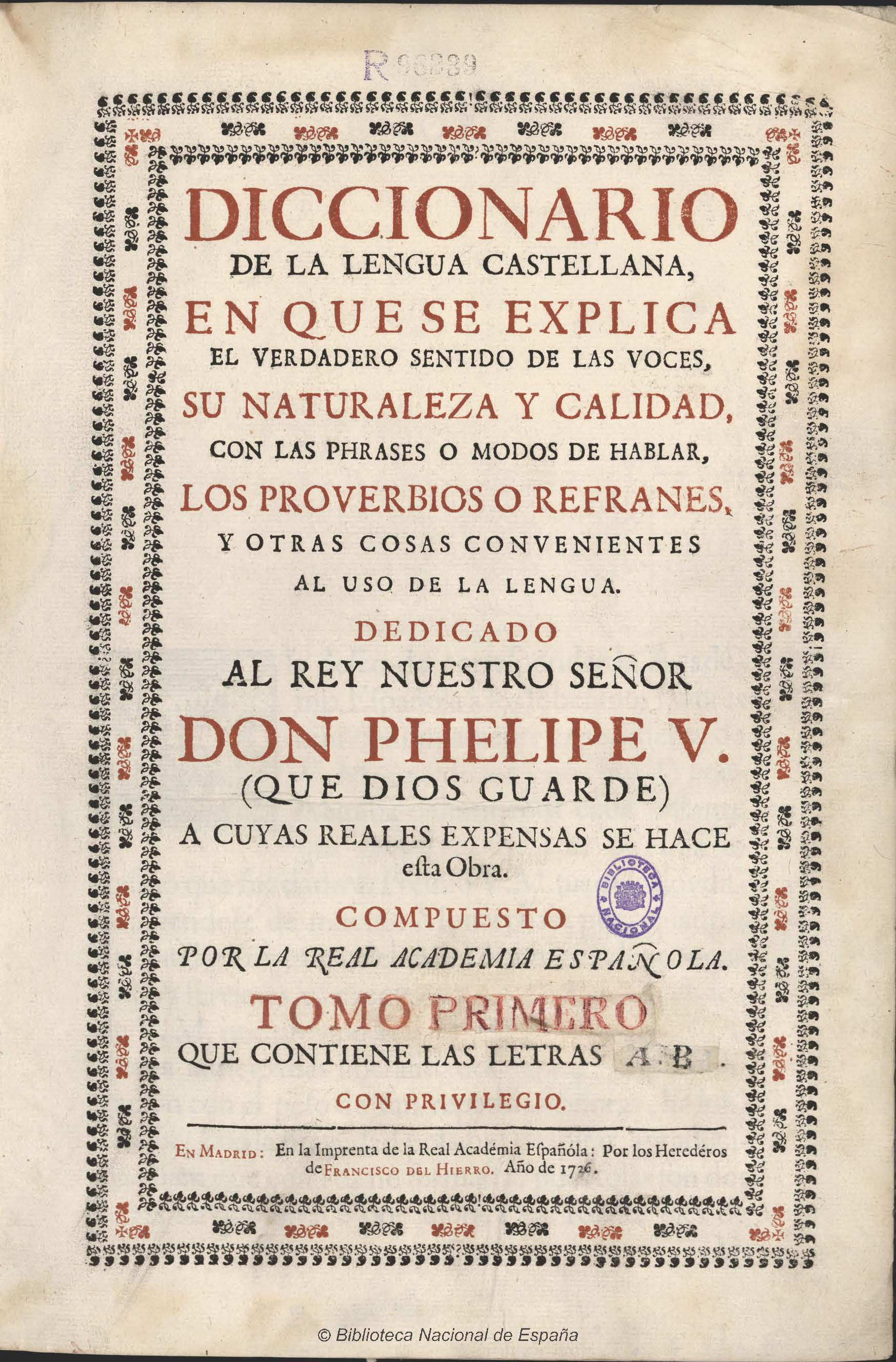 Diccionario de la lengua castellana en que se explica el verdadero sentido de las voces, su naturaleza y calidad, con las phrases o modos de hablar, los proverbios o rephranes, y otras cosas convenientes al uso de la lengua / Compuesto por la Real Academia Española... [Texto impreso]. - Madrid : en la imprenta de Francisco del Hierro, impressor de la Real Academia Española, 1726-1739. - 6 v.([8], LXXXXVI, 723 p., [1] h. de lám. ; [12], 714 p. ; [12], 816 p. ; [12], 696 p. [12], 656 p. ; [36], 578 p. ) ; Fol. mlla. Signatura R/23571. Portada a dos tintas enmarcadas con orlas tipográficas. Es el denominado comúnmente "Diccionario de Autoridades".